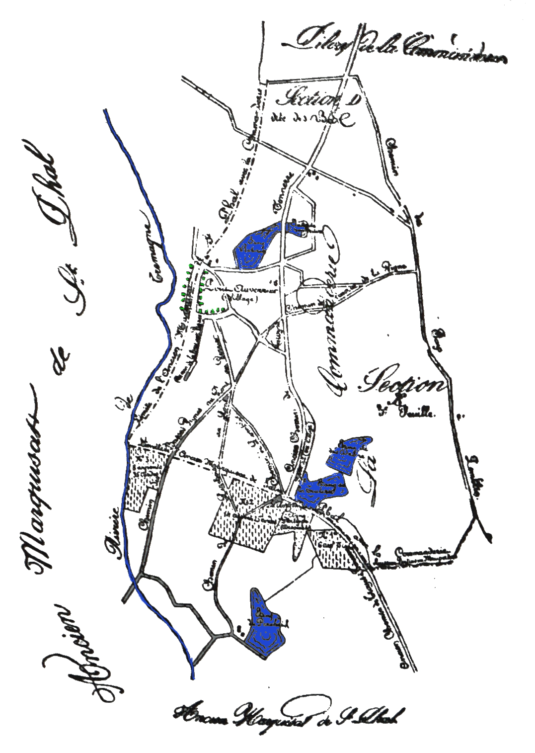 dessin issu des collections de l'Aube.